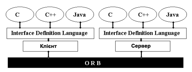 рисунок 1